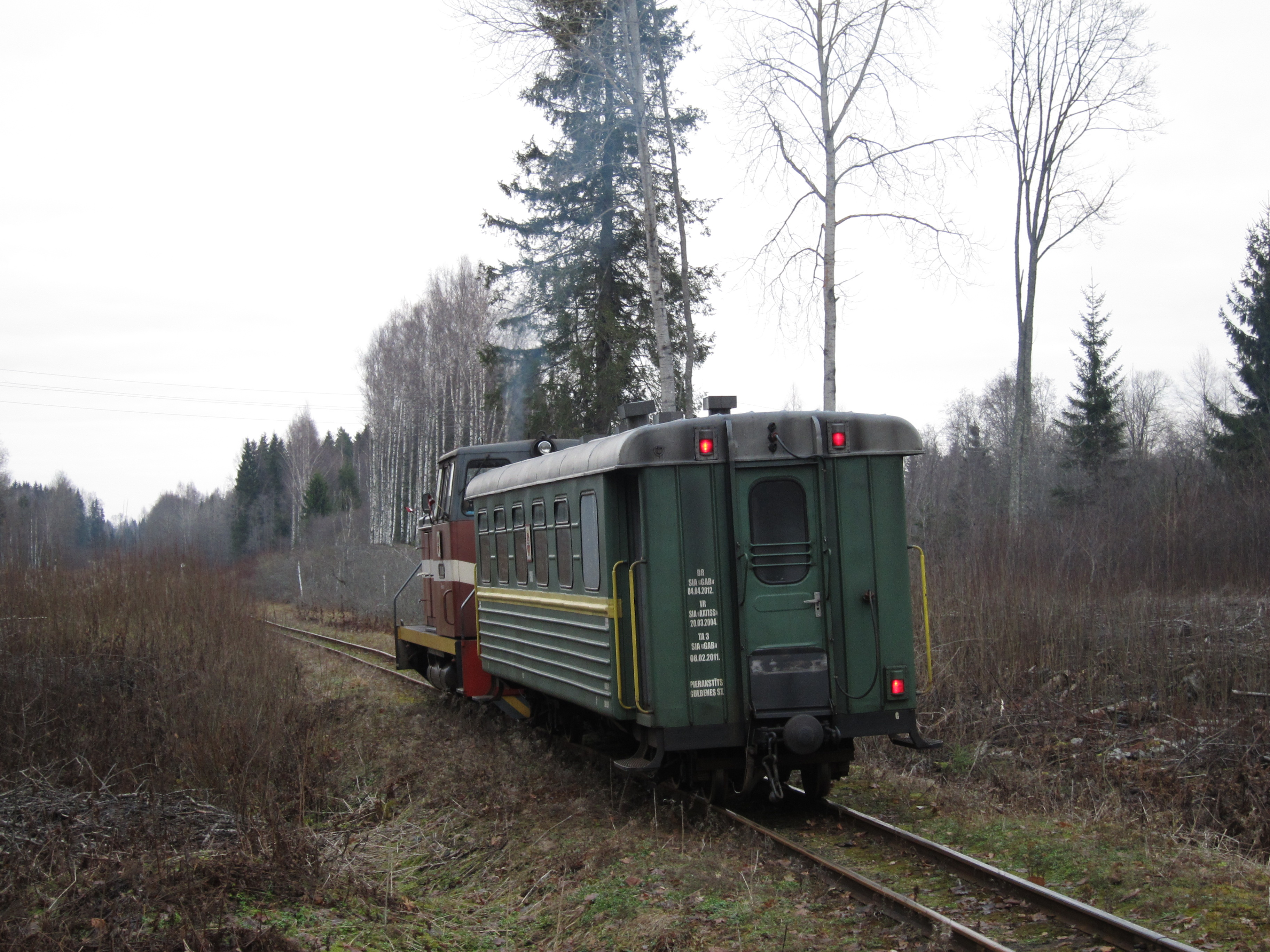 Pasažieru vilciens atiet no Vējiņu pieturas